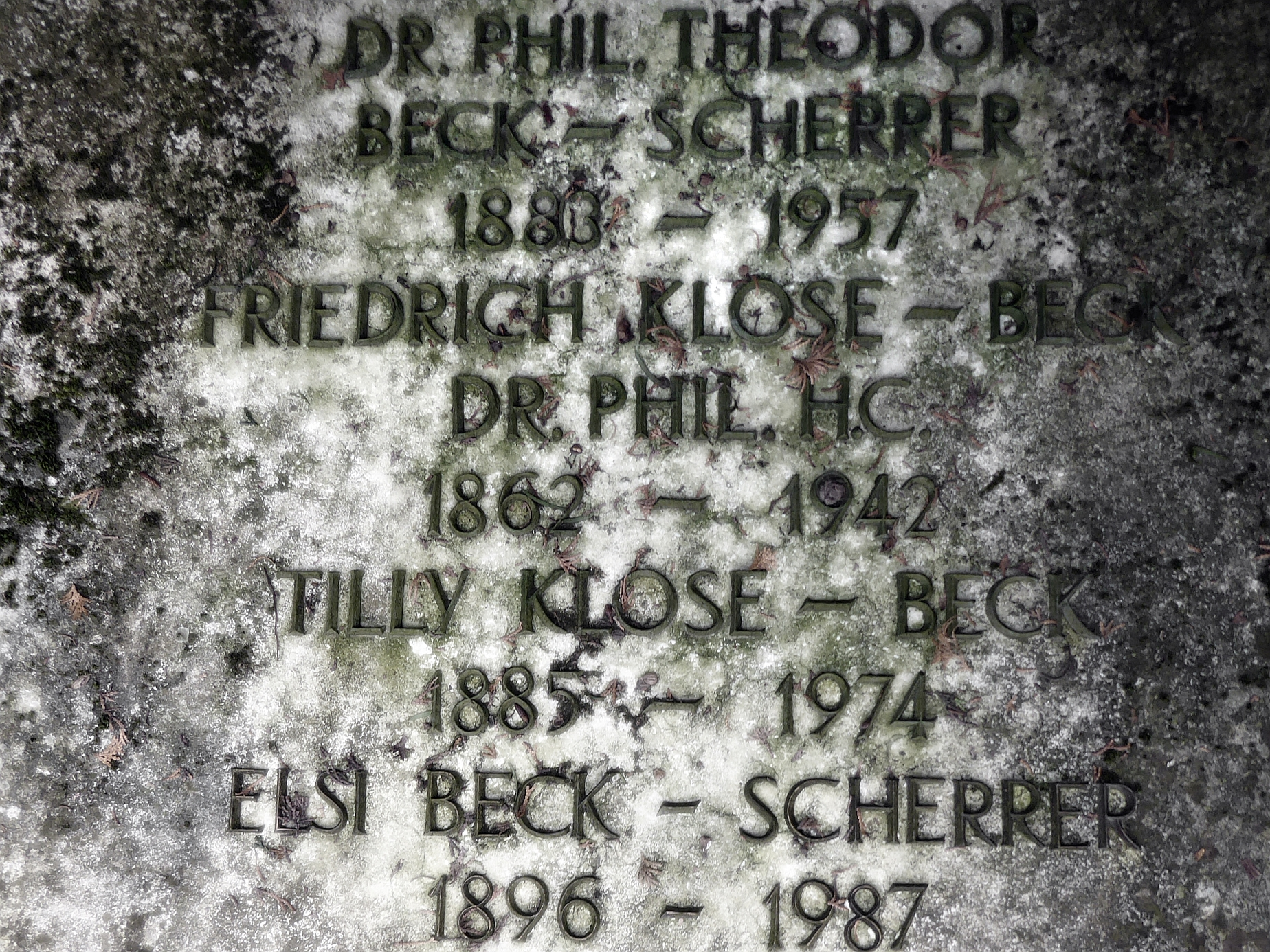 Friedrich Klose-Beck (1862–1942) Dr.phil. h.c., Komponist, Musikpädagoge, Familiengrab auf dem Friedhof Hörnli, Riehen, Basel-Stadt (1)